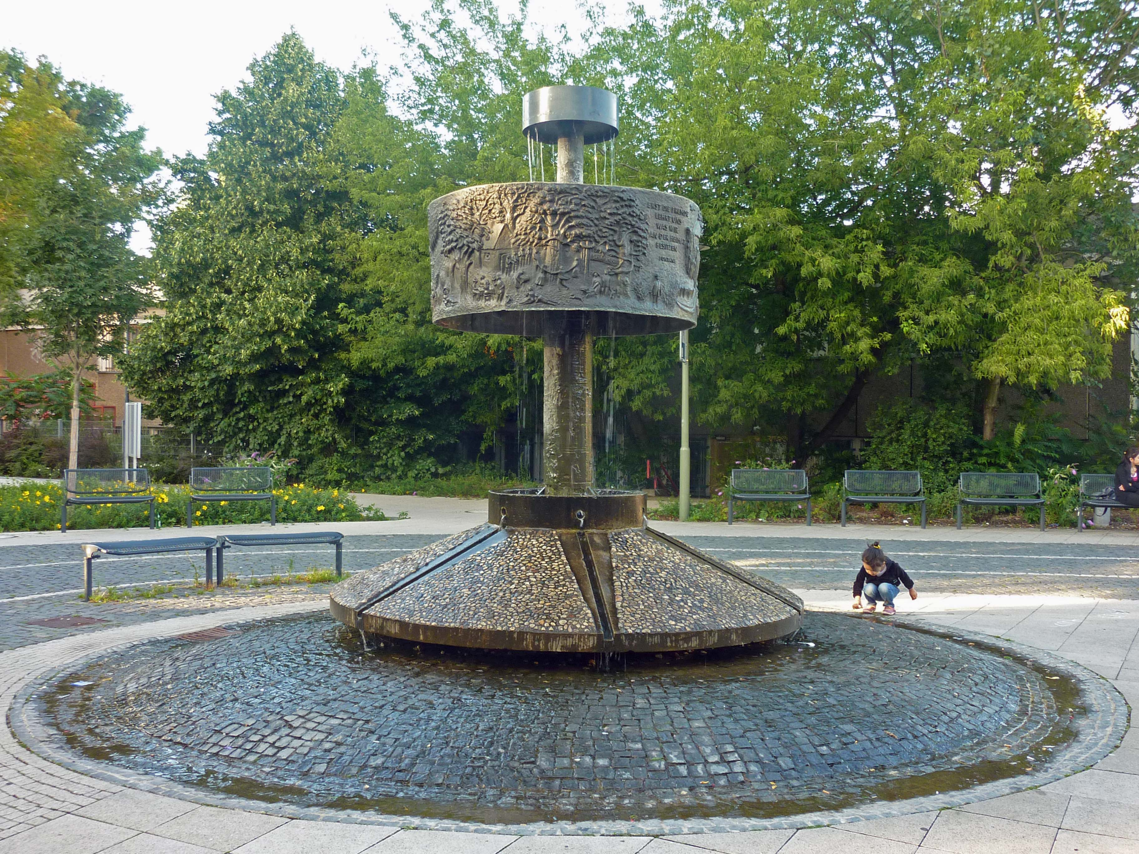 Südseite des Fontanebrunnens am Nordrand des Heinrich-Dathe-Platzes in Berlin-Friedrichsfelde. Der Brunnen mit bronzenem Reliefring wurde im Jahr 1982 nach einem Entwurf von Hans-Detlef Hennig gefertigt und die ursprüngliche Basisanlage eines kreisförmigen Hauptbeckens aus Beton im Jahr 2009 neu gestaltet.